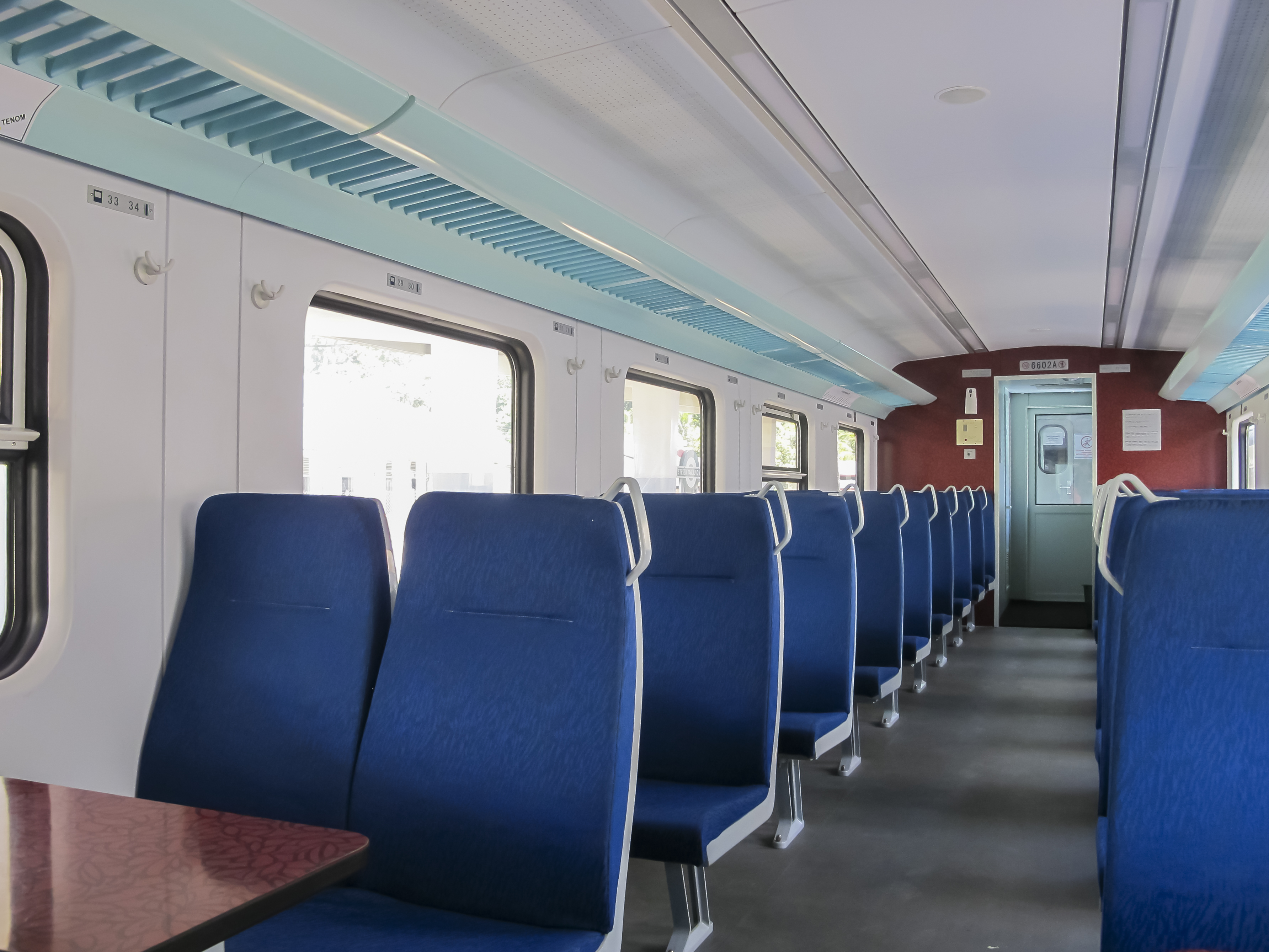 Kota Kinabalu, Sabah: Neue Passagierwaggons der Sabah State Railway, photographiert in Tg Aru